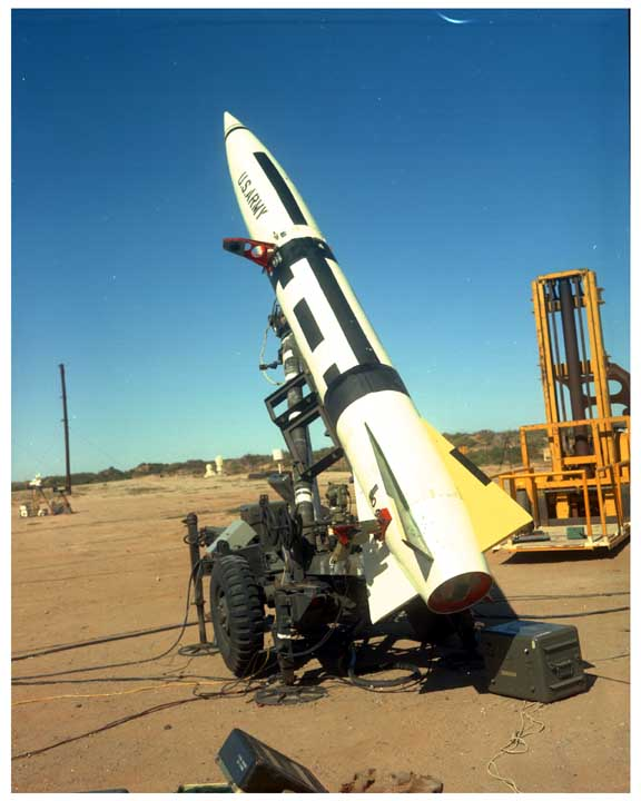 XMGM-52B Lance